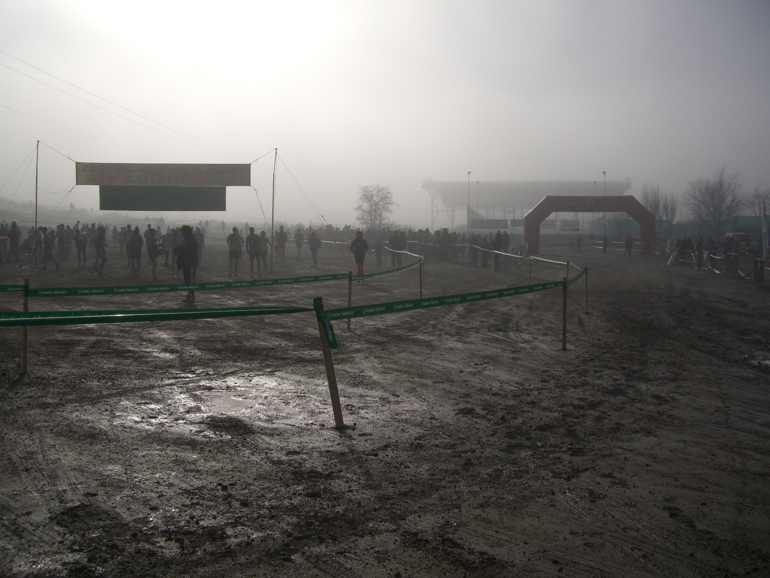 Zona de la sortida i arribada del 54è Cros de Calldetenes, celebrat el 21 de desembre de 2008.